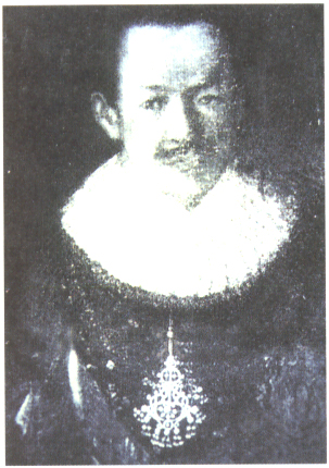 Count Friedrich Casimir († 1658), Graf Friedrich Casimir von Ortenburg